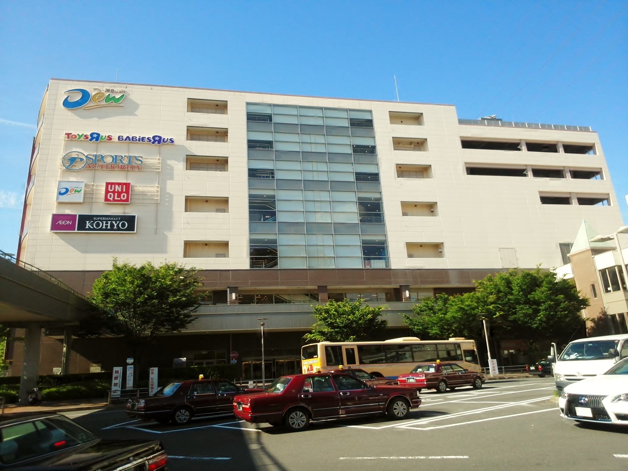 デュー阪急山田を撮影。